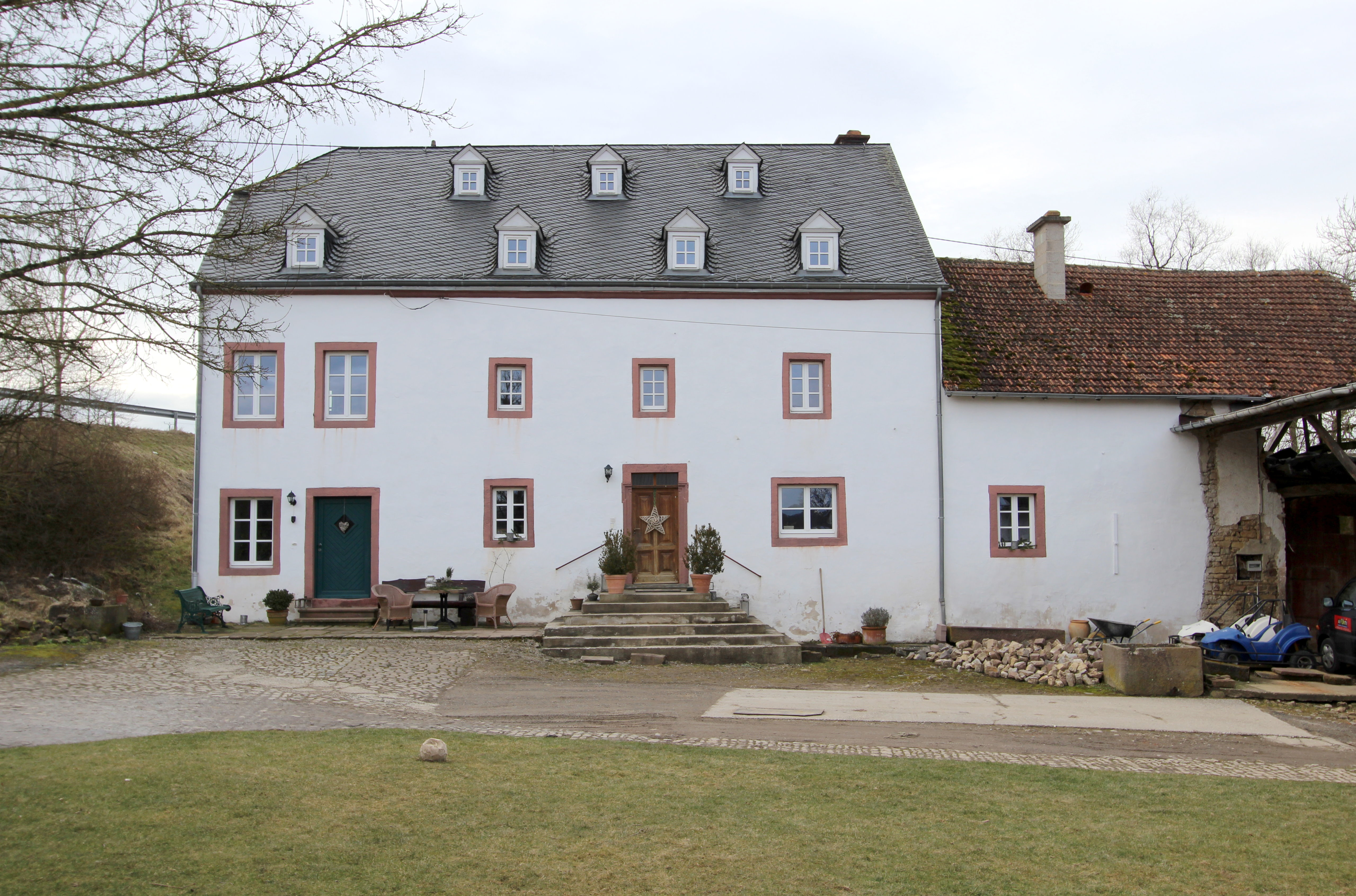 54634 Irsch. Winkelhof; dreiachsiges Wohnhaus, bezeichnet 1751, Erweiterung mit ehemaliger Schmiede, Backes, Scheune und Ställe, äußerster bezeichnet 1785 In der mittleren seiner drei Achsen steht über zweiarmiger Freitreppe das später veränderte Portal mit dem Namen des Erbauers Theodor Weiman und der Jahreszahl 1751 auf dem Sturz. Aufnahme von 2018.